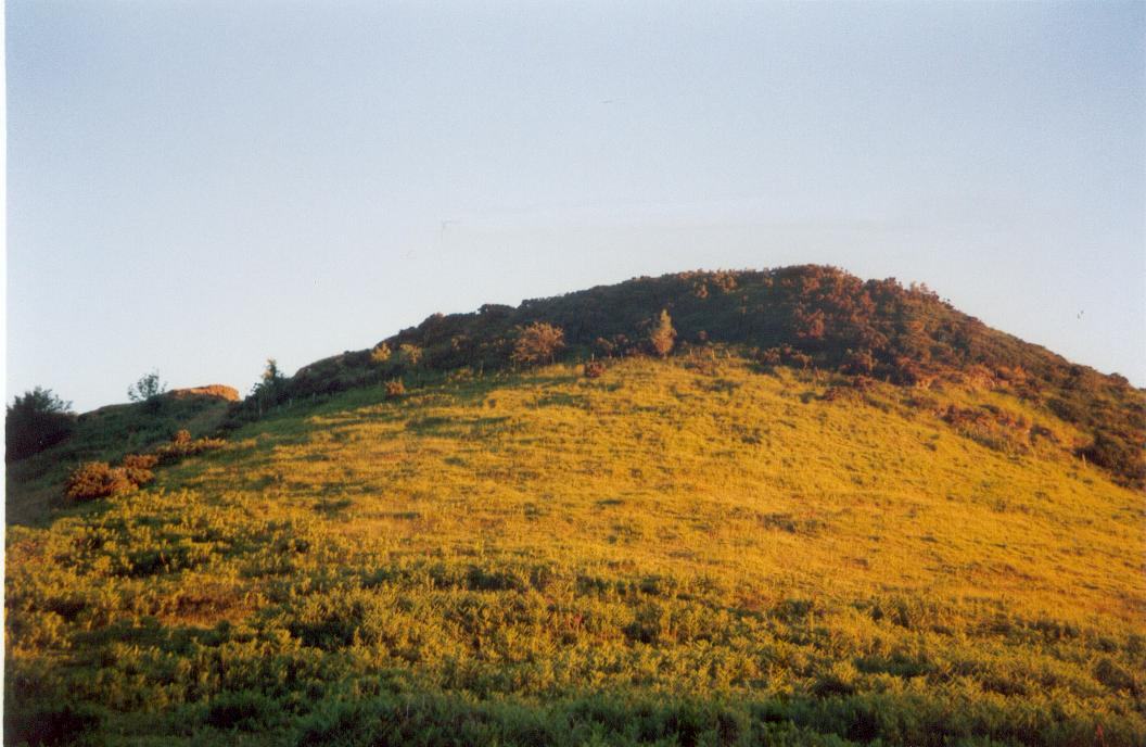 Monte Gaztelumendi de los Intxortas